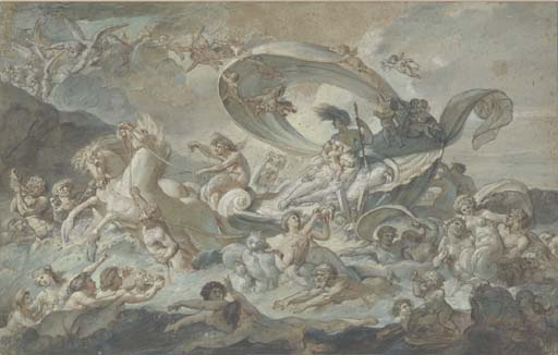 Il trionfo di Galatea, penna e carboncino su carta blu, 39.7 x 62.9 cm, Collezione privata